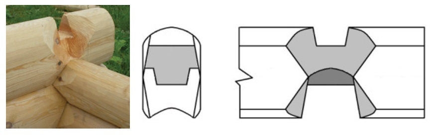 Соединение бревен сруб